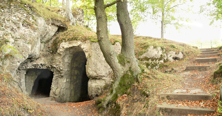 Auf der Oberburg von Burg Scharzfels, Gang vom Eingangstor